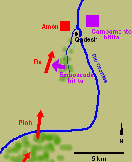 Mapa batalla Qadesh